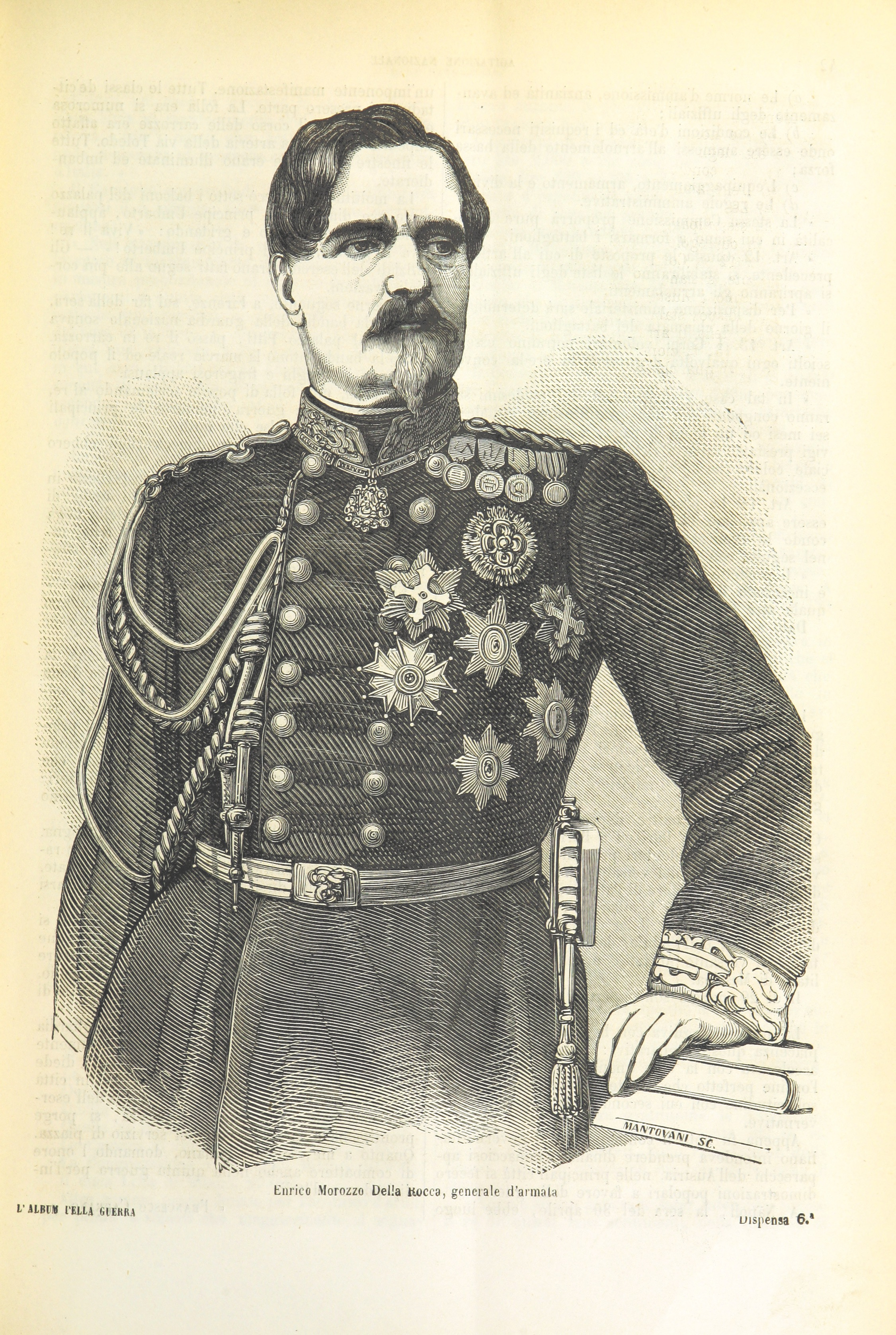 Enrico Morozzo della Rocca